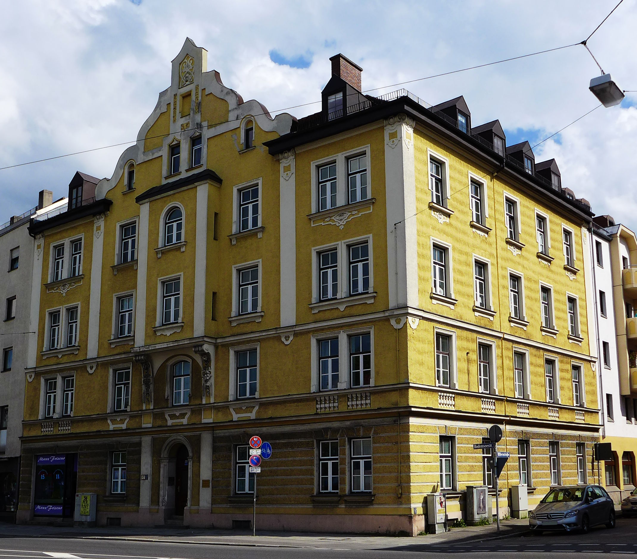 Bodenseestr. 23, München